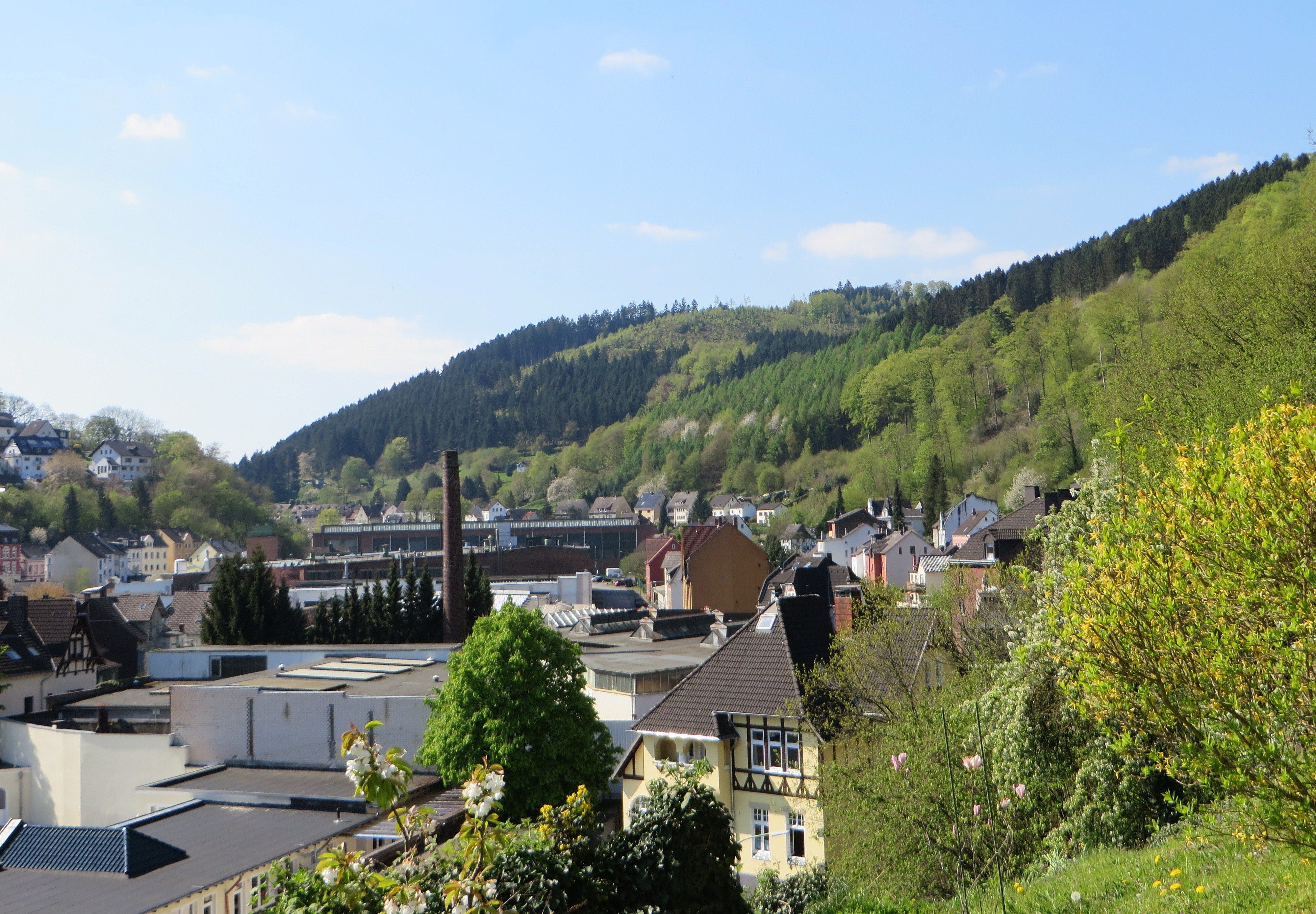 Blick von der Uferstraße auf die Mühlenteichstraße im Nahmertal Richtung Schleipenbergstraße im Hagener Stadtteil Hohenlimburg. Der Ortsteil Nahmer gehört zu den ältesten Gewerbetälern Westfalens. Im 16. Jahrhundert wird schon eine Drahtrolle erwähnt, 1571 ein Kupferhammer gegründet und 1810 bei J.P. Hüsecken das Kaltwalzen erfunden. Seit dieser Zeit entwickelten sich hier größere Industriebetriebe, darunter Puddel-, Walz- und Röhrenwerke. Die Standortnachteile zwangen aber seit den 1970er Jahren viele Betriebe sich zu verlagern oder zu schließen. Das große Waldgebiet (rechts), westlich von Nahmer- und Nimmertal, liegt im Landschaftsschutzgebiet „Stoppelberg“, mit Wanderwegen von Schloss Hohenlimburg über Schleipenberg (336 m), Schmittau, Stoppelberg (378 m) bis nach Brechtefeld. In Höhe der Stahlschmiede befindet sich die ehemalige Wallburg „Sieben Gräben“.